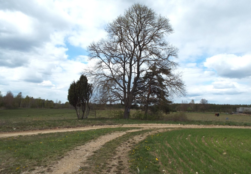 Šiaudinių kaimo senosios kapinės